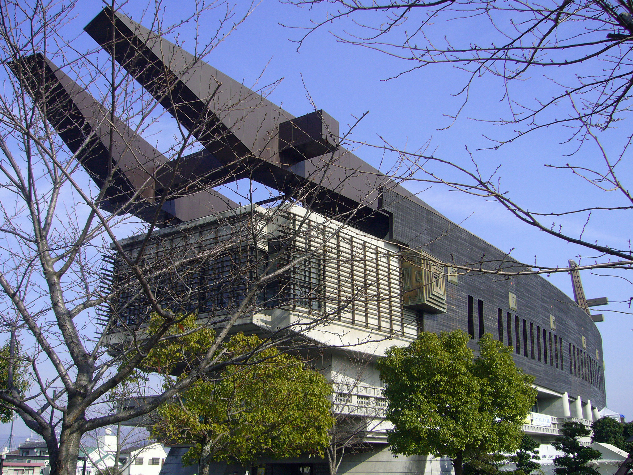 Aiserushura-hall in Fujiidera, Osaka, Japan